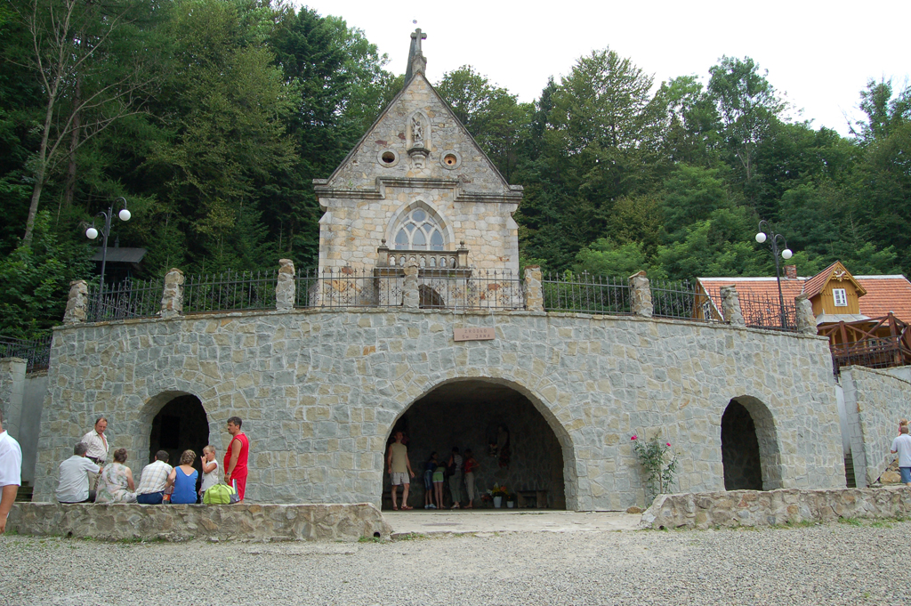 Cudowne źródełko znajdujące się pod kaplicą św. Jana z Dukli w Trzcianie